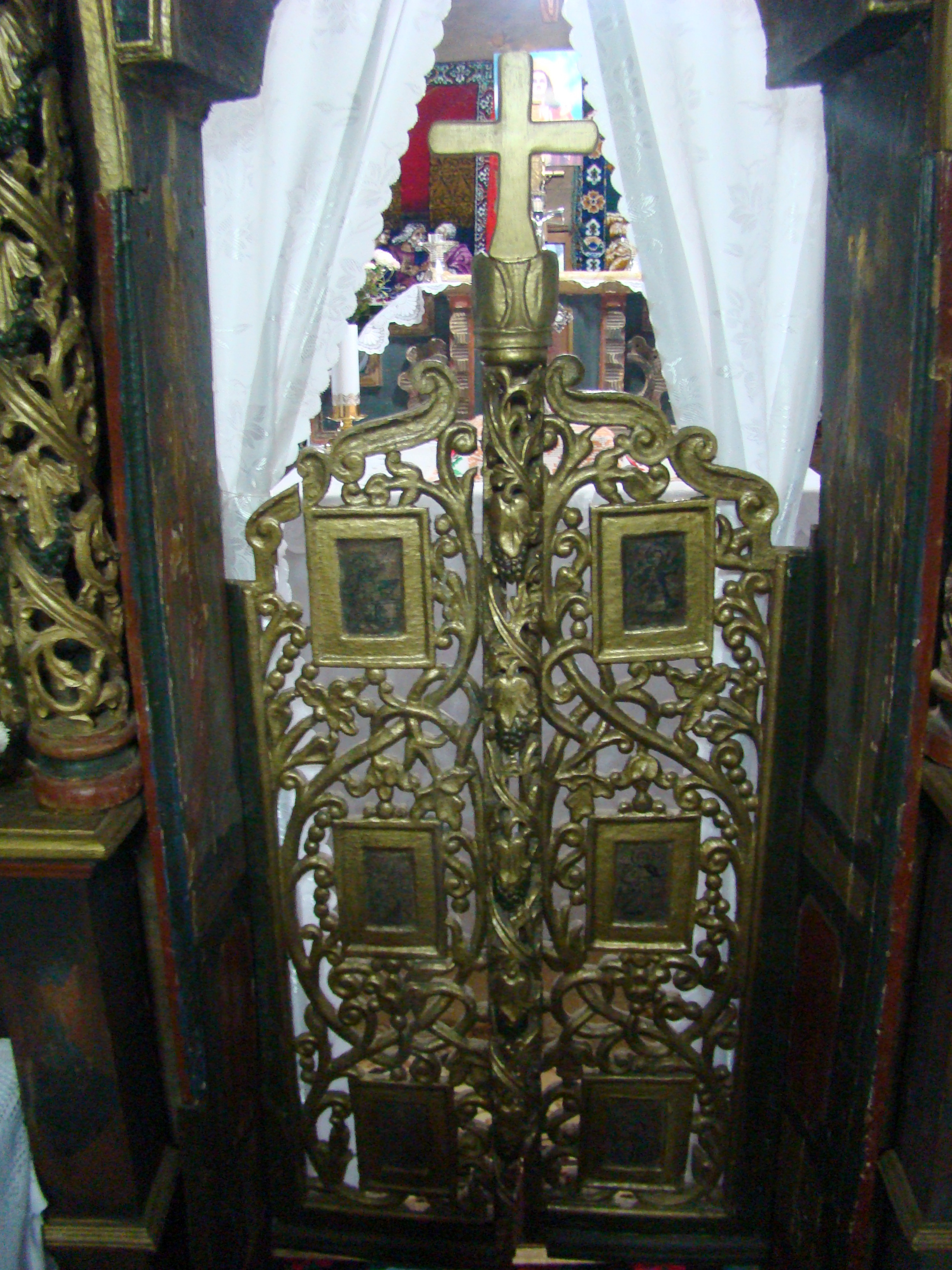 Biserica de lemn "Nașterea Maicii Domnului", sat Rona de Jos; comuna Rona de Jos, județul Maramureș